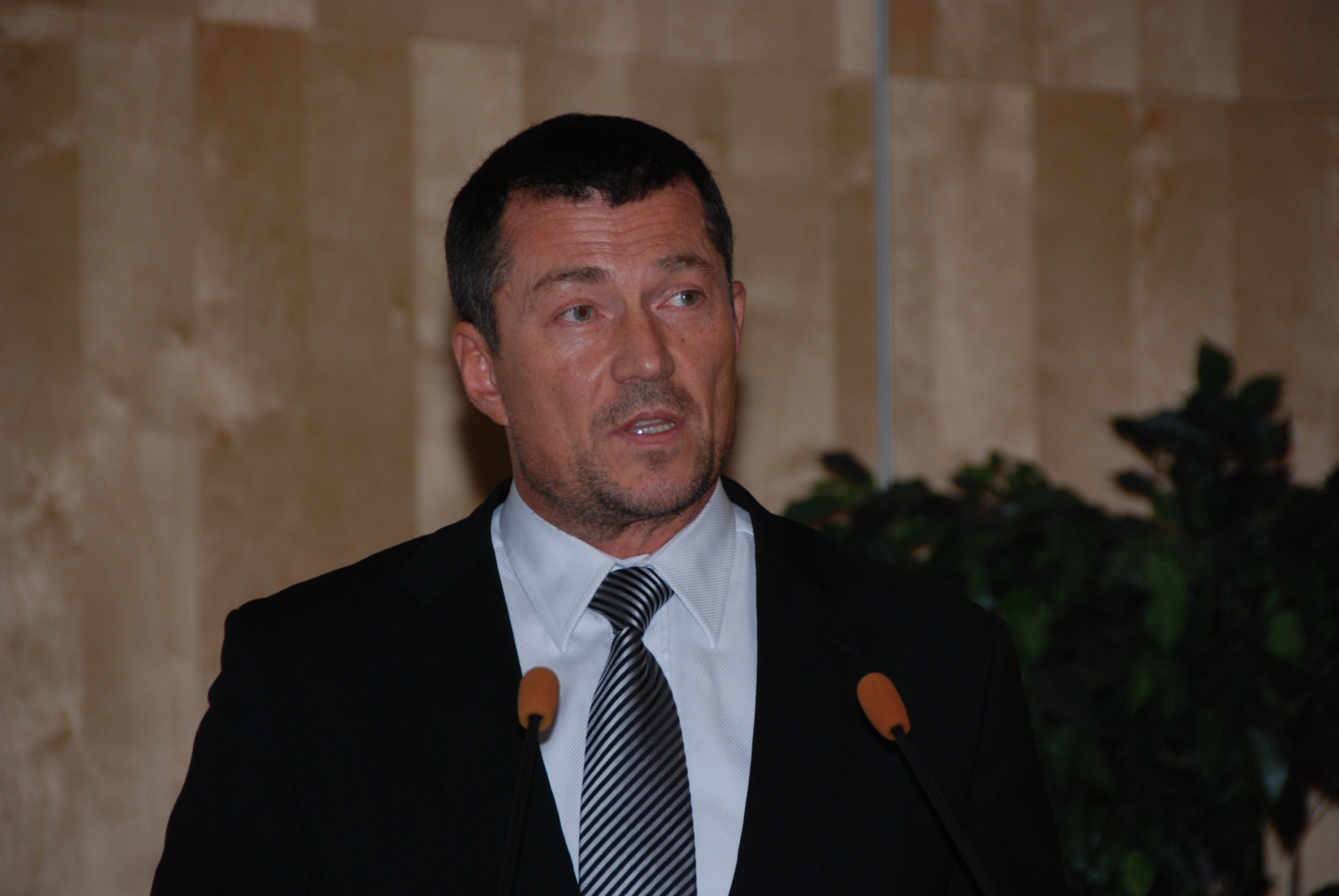 Latvijas Nacionālās operas direktors Andrejs Žagars Foto: Aivis Freidenfelds, Valsts kanceleja